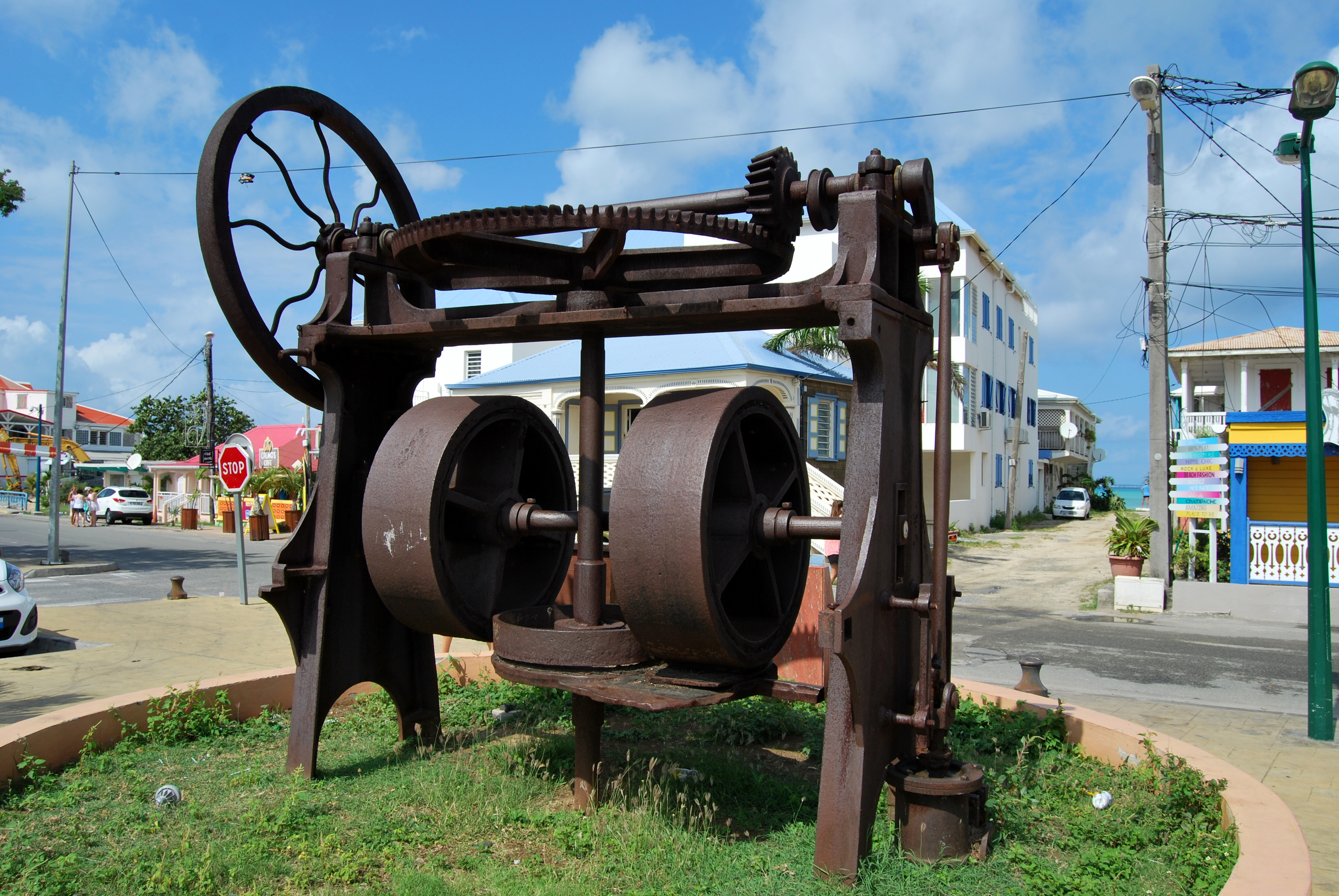 Moulin à sel, Grand-Cas, St Martin, (Antilles françaises)